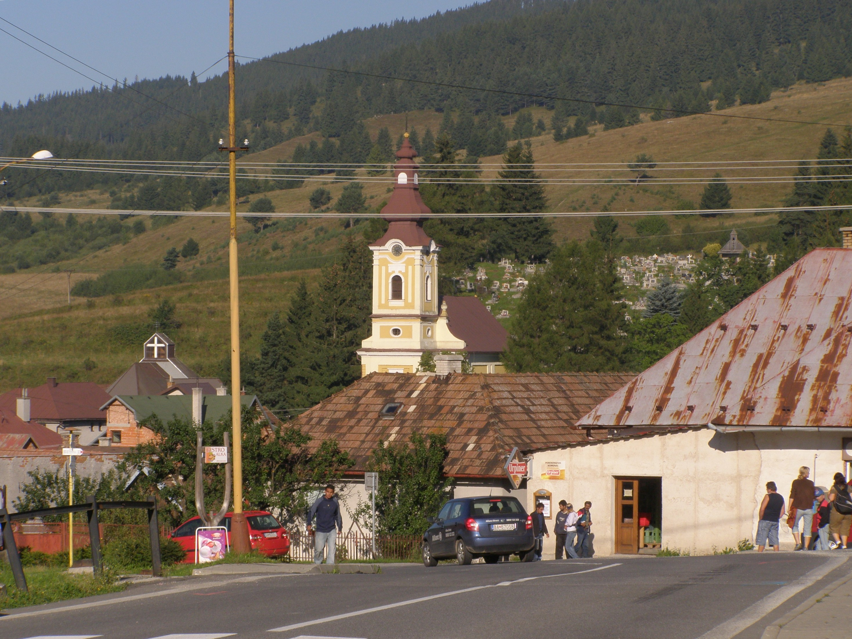 Telgárt, centrum obce